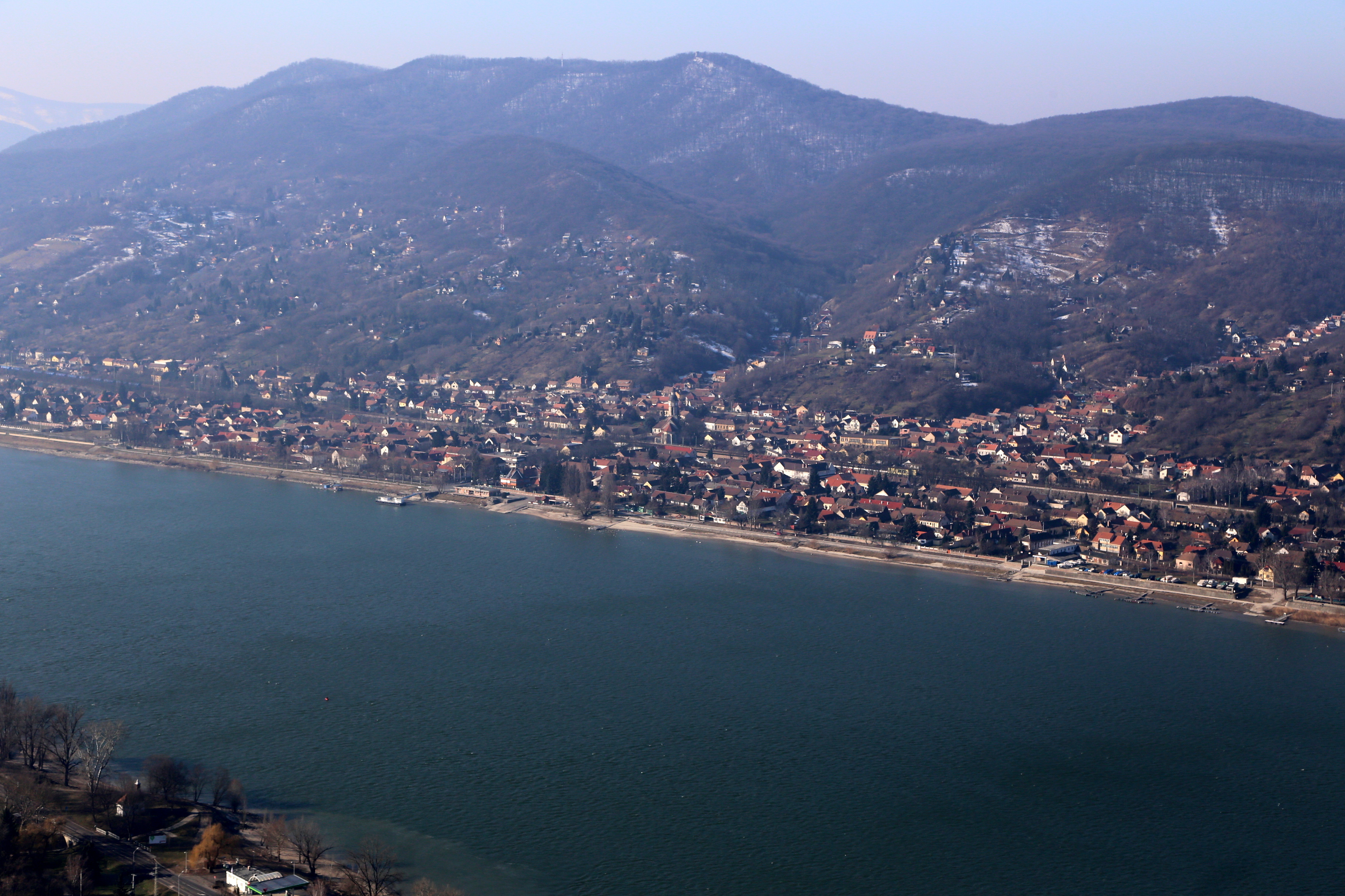 Nagymaros